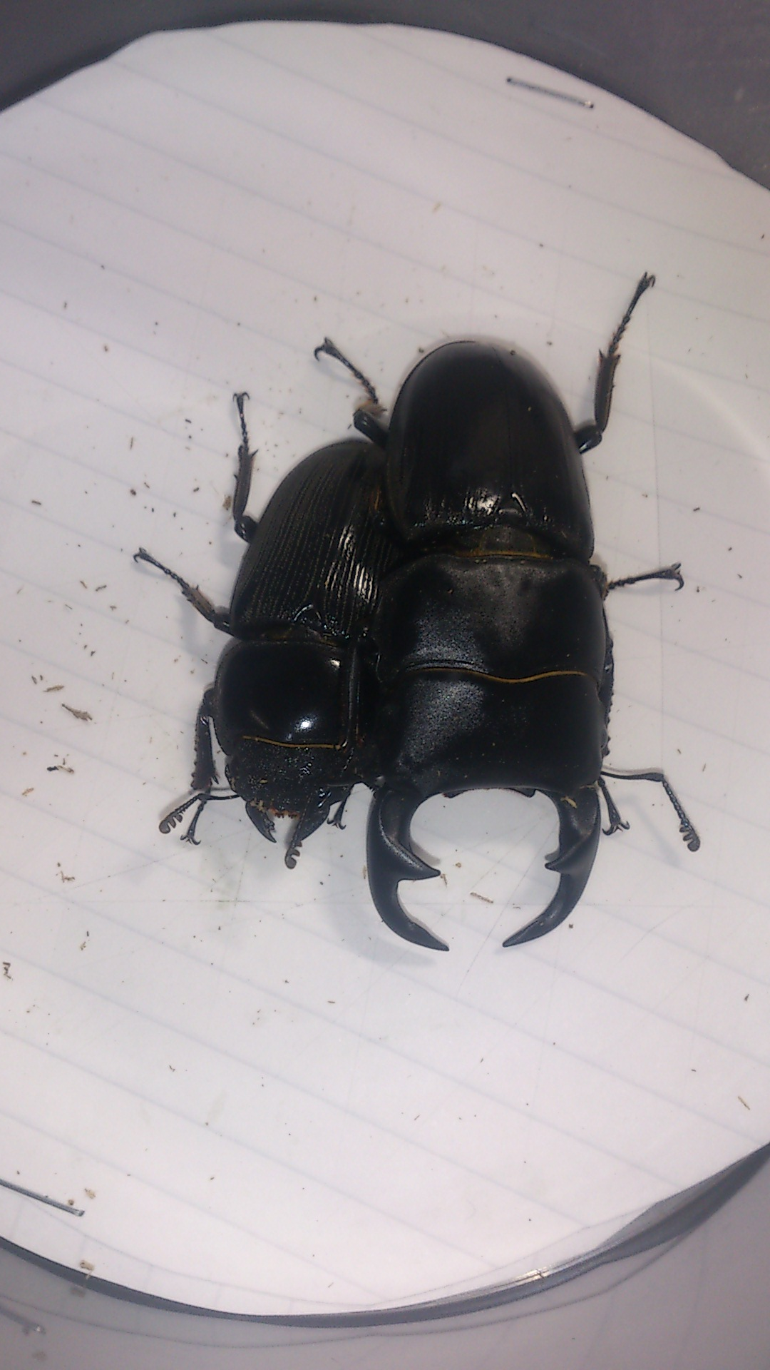 リツセマオオクワガタのペア。